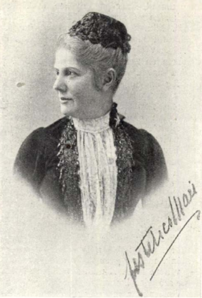 Gróf tolnai Festetics Mária (1839–1923) csillagkeresztes hölgy, Erzsébet királyné udvarhölgye, söjtöri nagybirtokos